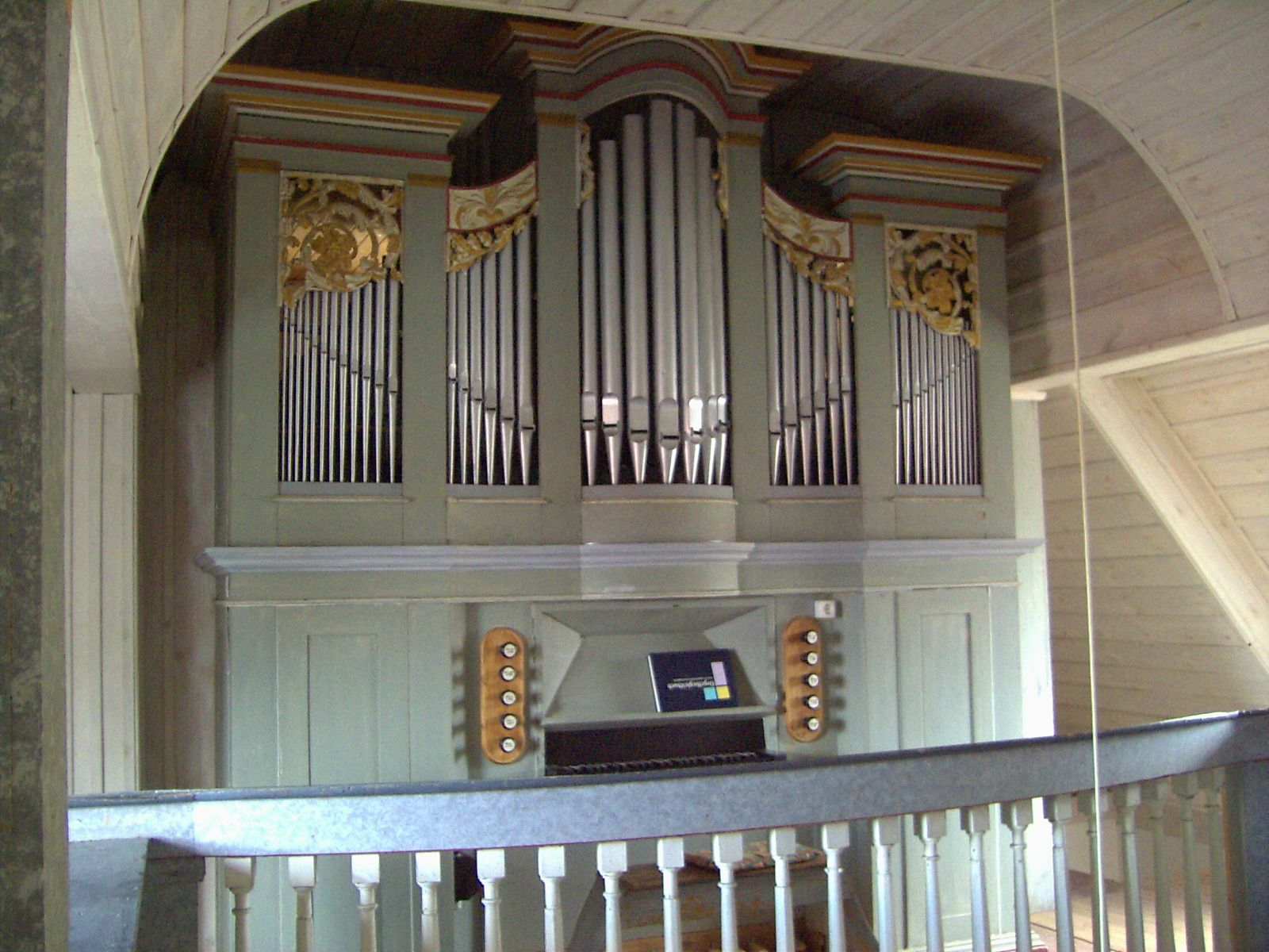 Mechelroda